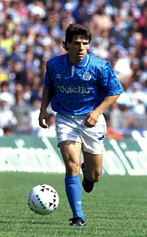 L'attaccante italiano Gianfranco Zola ai tempi del Napoli. Licensing Zola, Gianfranco, 1991-1992 1991-1992